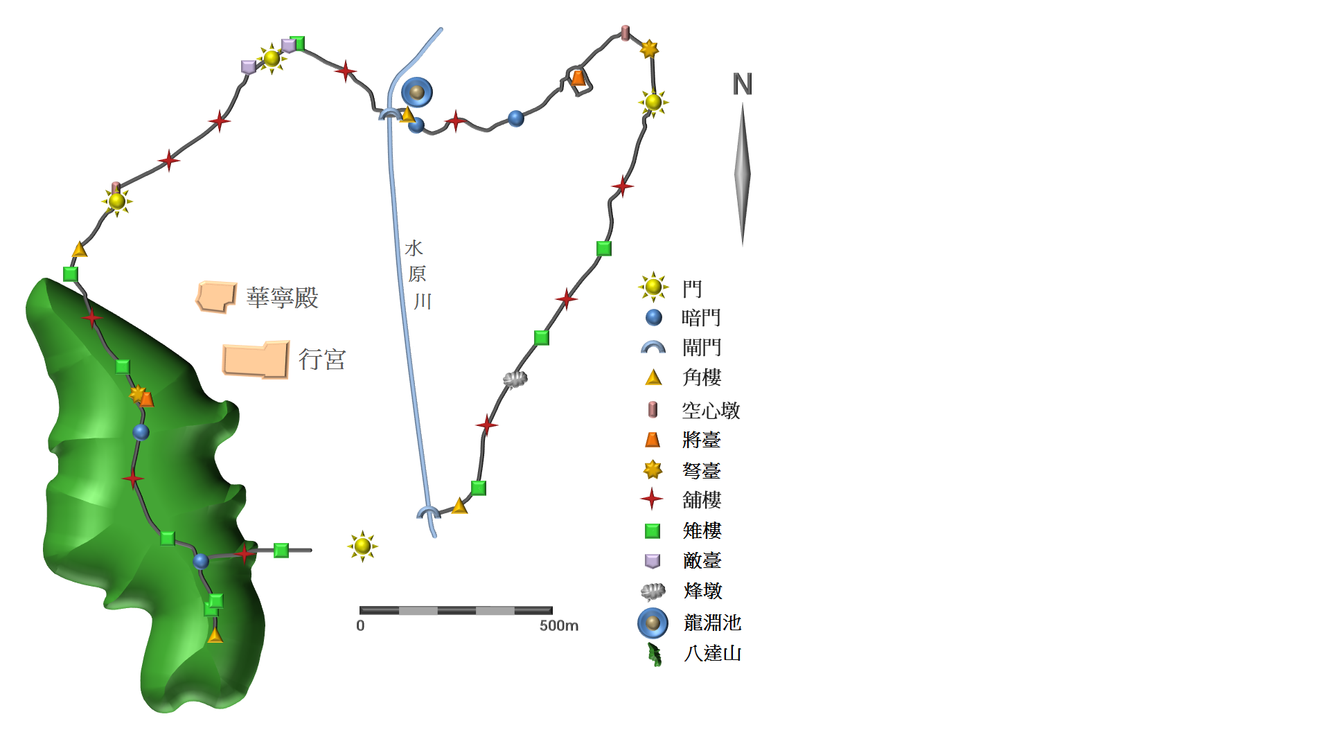 中文（香港）: 水原華城地圖中文版